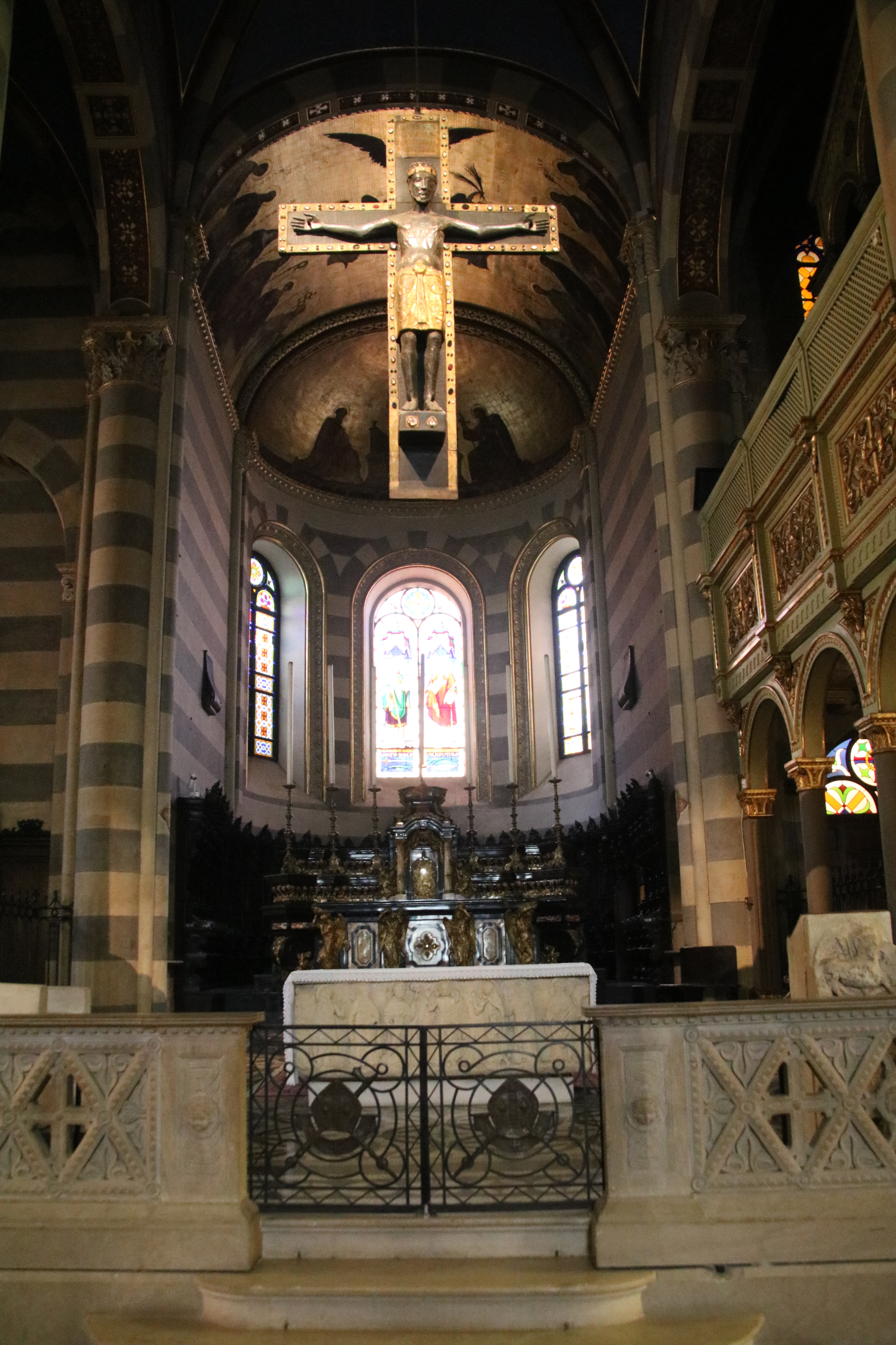 duomo di Sant'Evasio This is a photo of a monument which is part of cultural heritage of Italy.